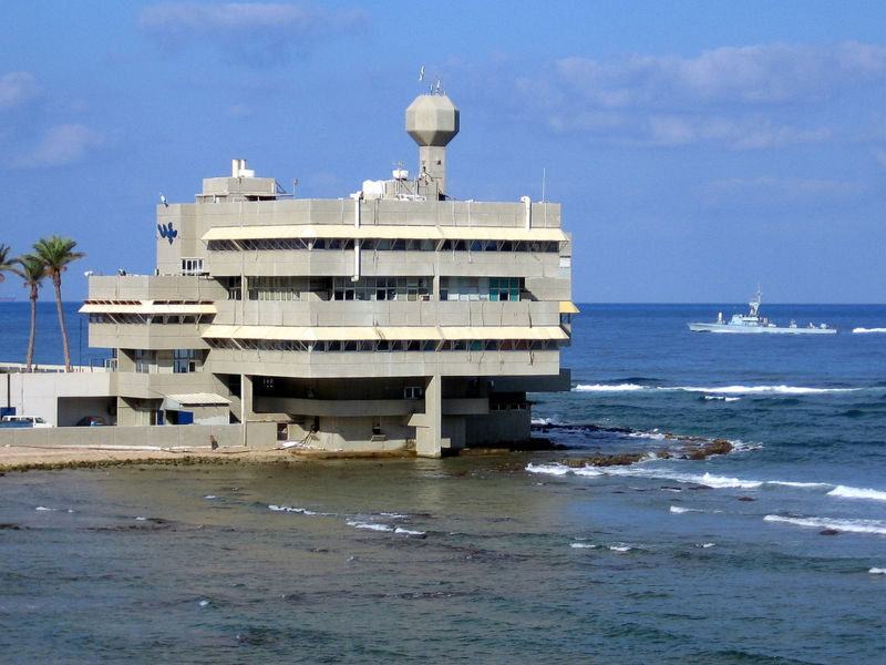 taken by Golf Bravo המכון הלאומי לאוקיאנוגרפיה שהוא חלק מן he:המכון לחקר ימים ואגמים